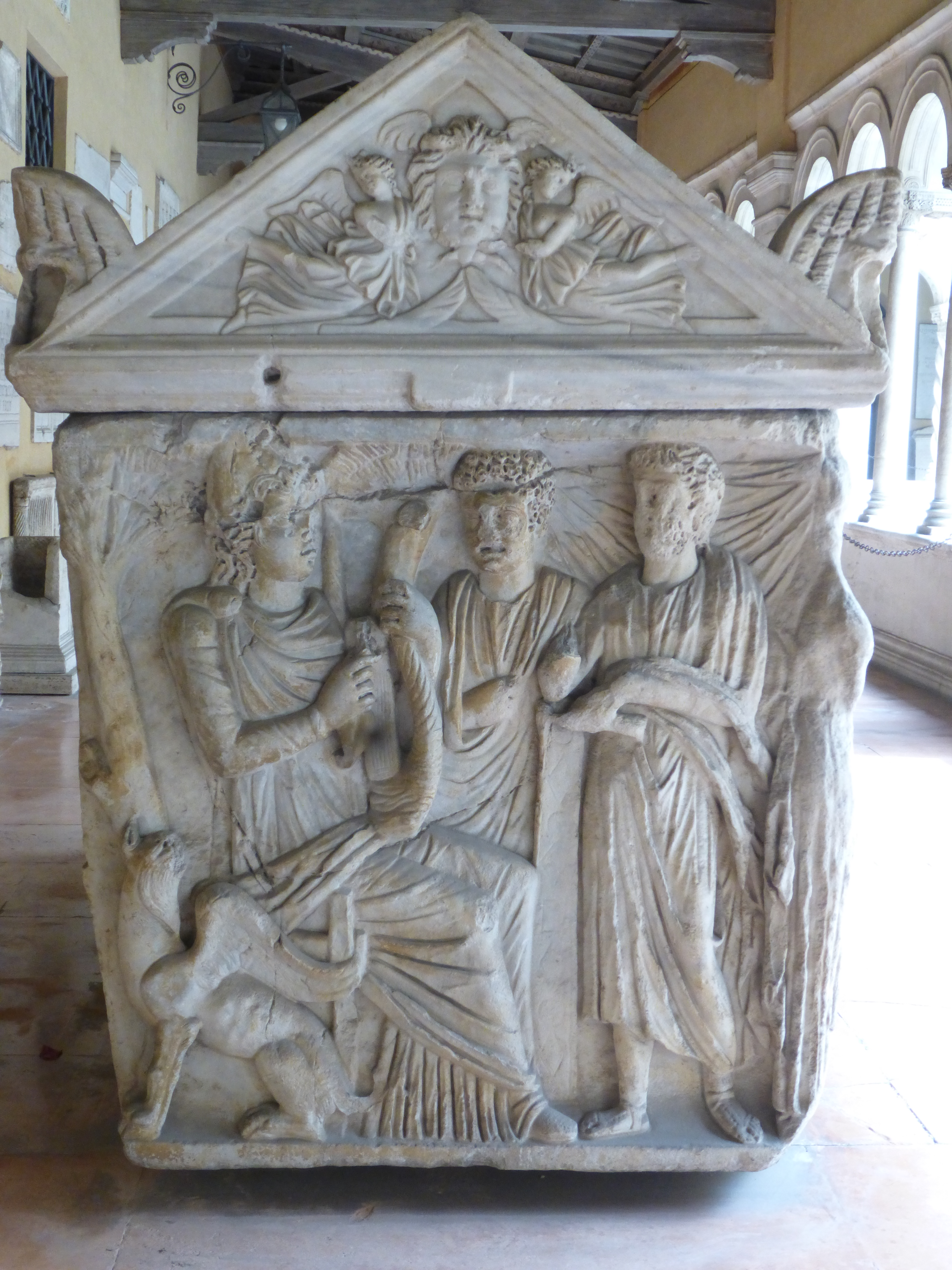 Roma, chiostro di S. Paolo fuori le mura: sarcofago di III sec. reimpiegato tra il 1124 e il 1130 come sepolcro di Pietro di Leone Pierleoni.